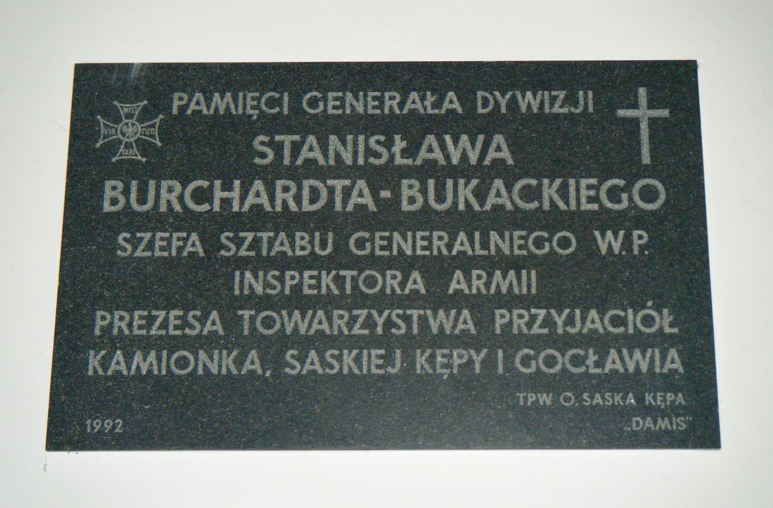 Tablica pamiątkowa w w kościele parafialnym przy ul. Alfreda Nobla w Warszawie.